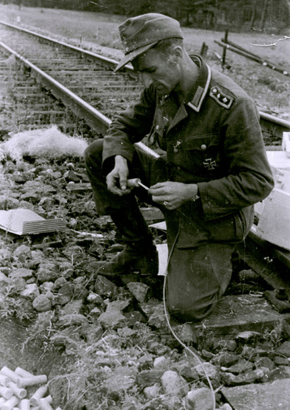 Sowjetunion-Heeresgruppe Mitte: Oberfeldwebel (ausgezeichnet mit Eisernem Kreuz I. Klasse) mit Dynamitstange und Zündkabel bei der Vorbereitung zum Sprengen von Bahngleisen bei Grodno (am linken unteren Bildrand befindet sich ein Loch mit vielen Dynamitstangen); PK KBZ HGr Mitte Juli 1944